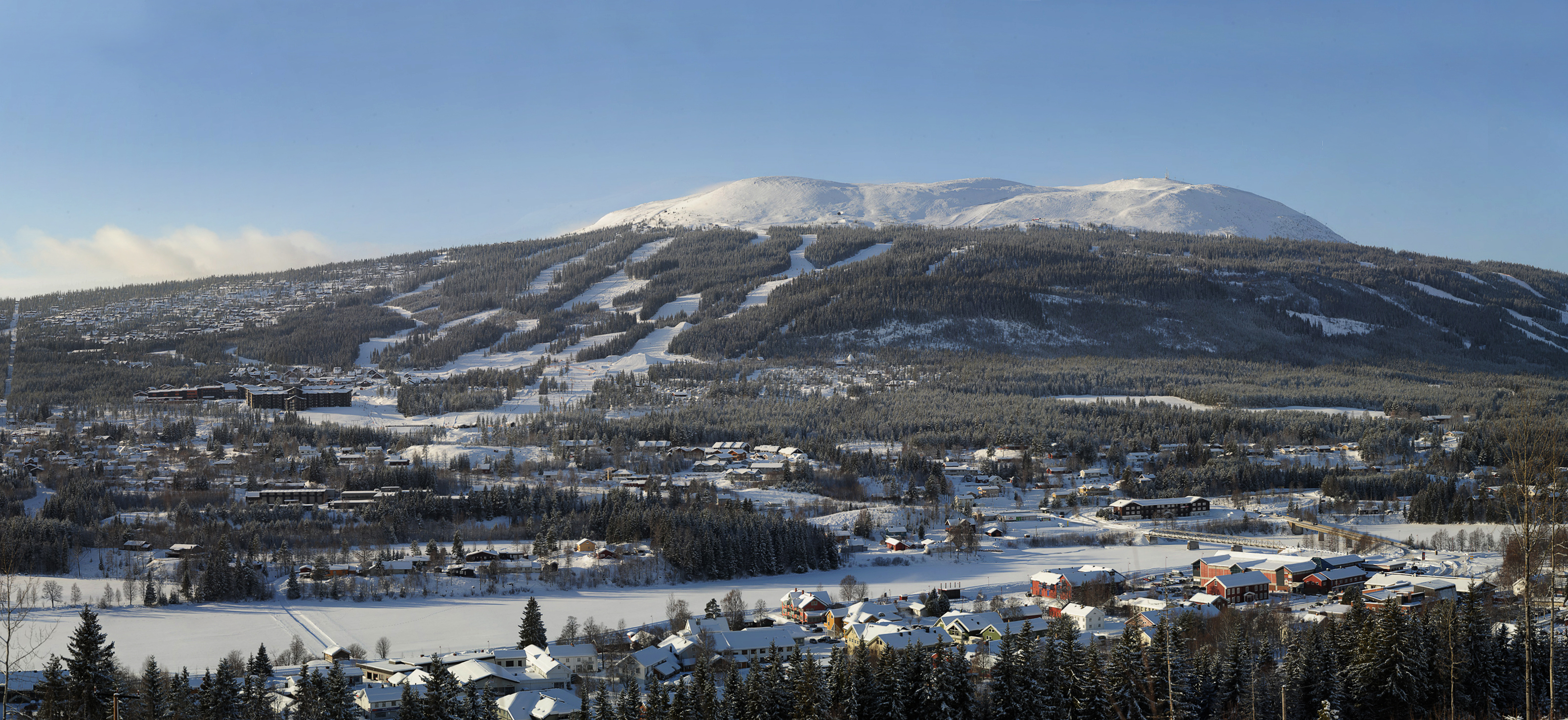 Trysil - Norges største skisted. Foto: Ola Matsson